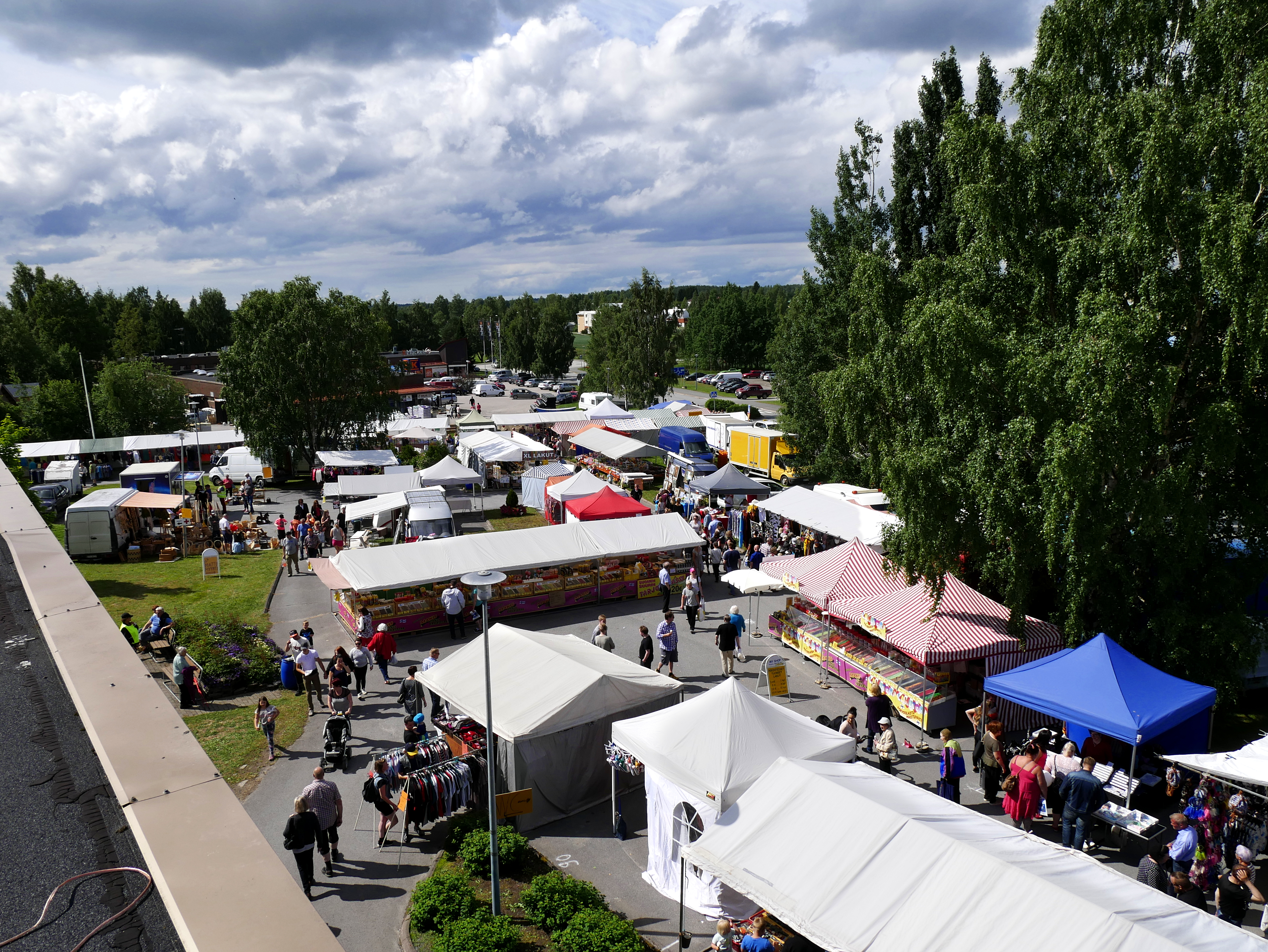 Lappajärven markkinat heinäkuussa 2017, Lappajärven markkinoita on järjestetty vuodesta 1969 lähtien.